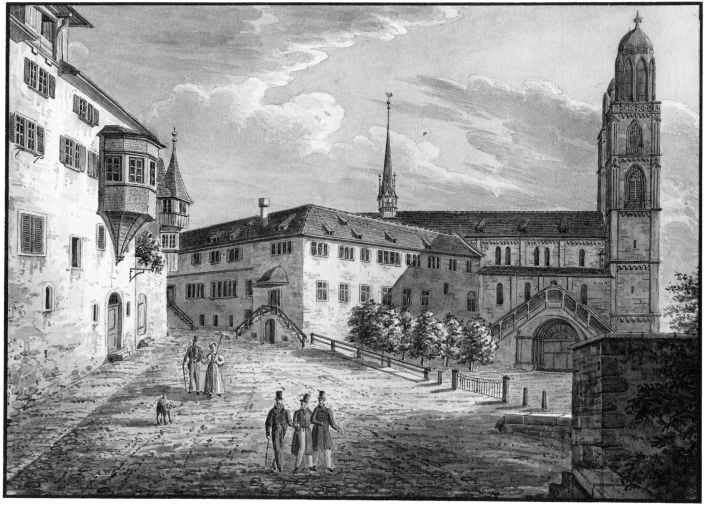 Das Grüne Schloss, das alte Chorherrenstift und das Grossmünster in Zürich um 1835. Sepiazeichnung von Emil Schulthess. Kunsthaus Zürich.